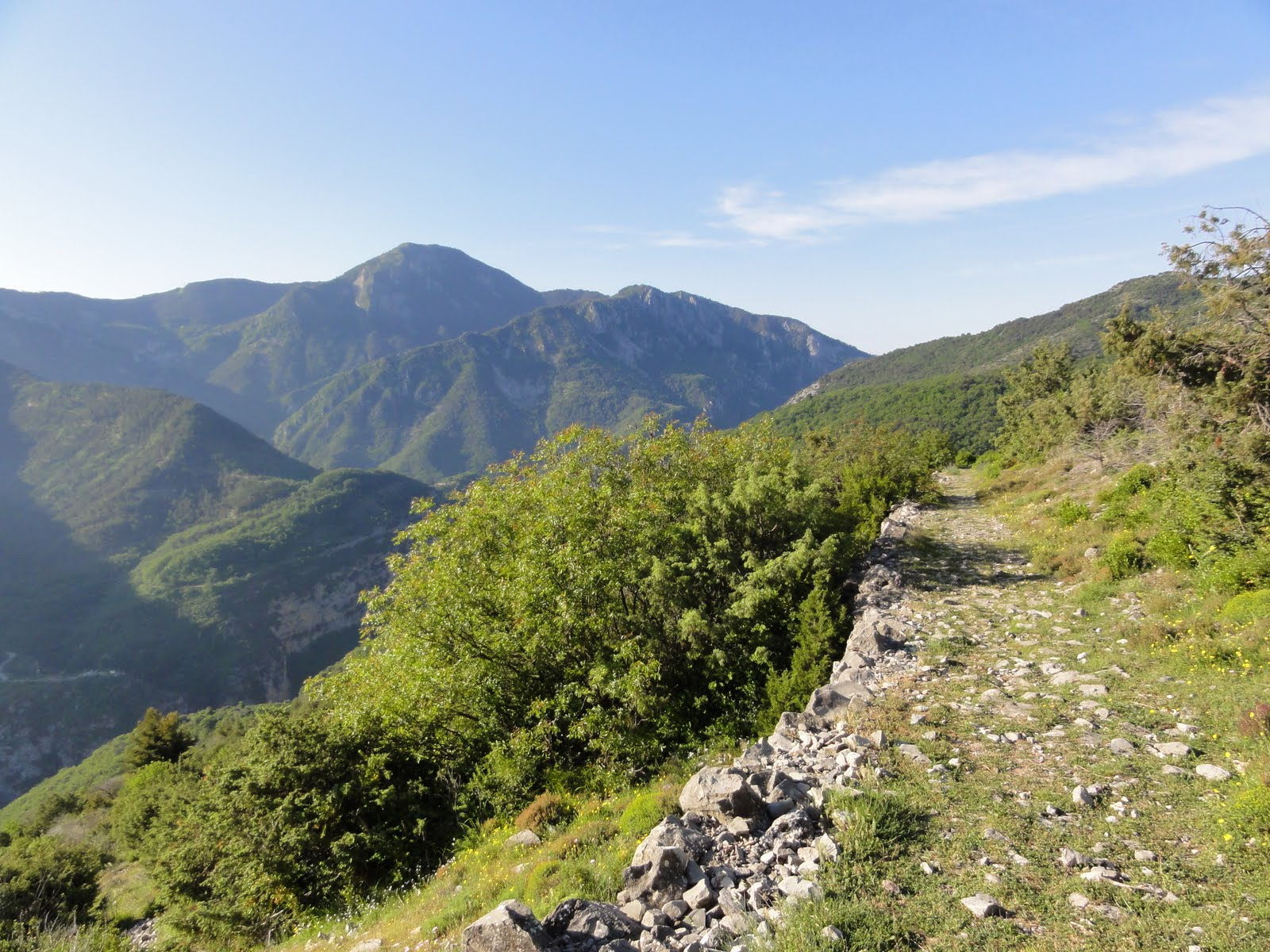 GR5 from Utelle to Le Cros-d'Utelle